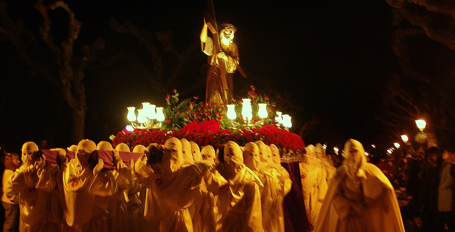 Procesión “El Encuentro” , Jueves Santo, “Paseo de la Isla” hacia la catedral, Burgos, España